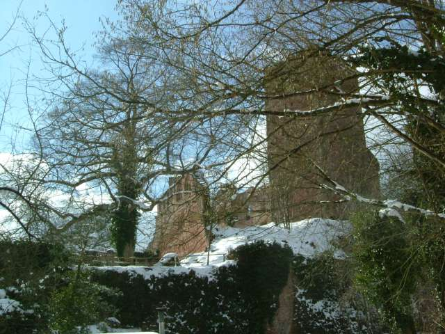 Henneburg auf dem Kühlberg in Stadtprozelten, Bayern. Ein Blick vom Neuen Weg auf die Ruine; ursprünglich "Burg Prozelten" genannt.